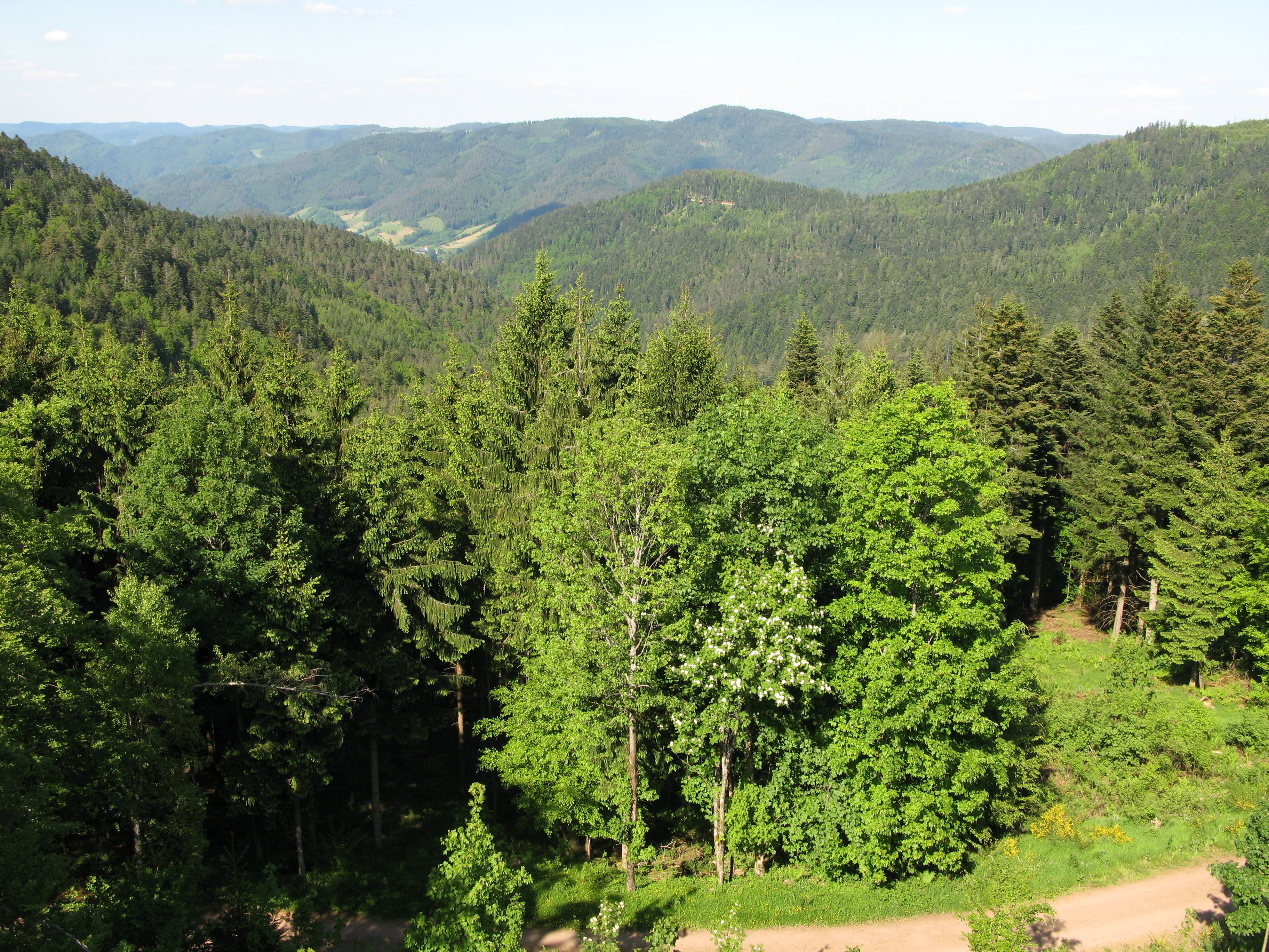 Ausblick vom Huberfelsen am Westweg und am Zweitälersteig bei Oberprechtal im Schwarzwald.